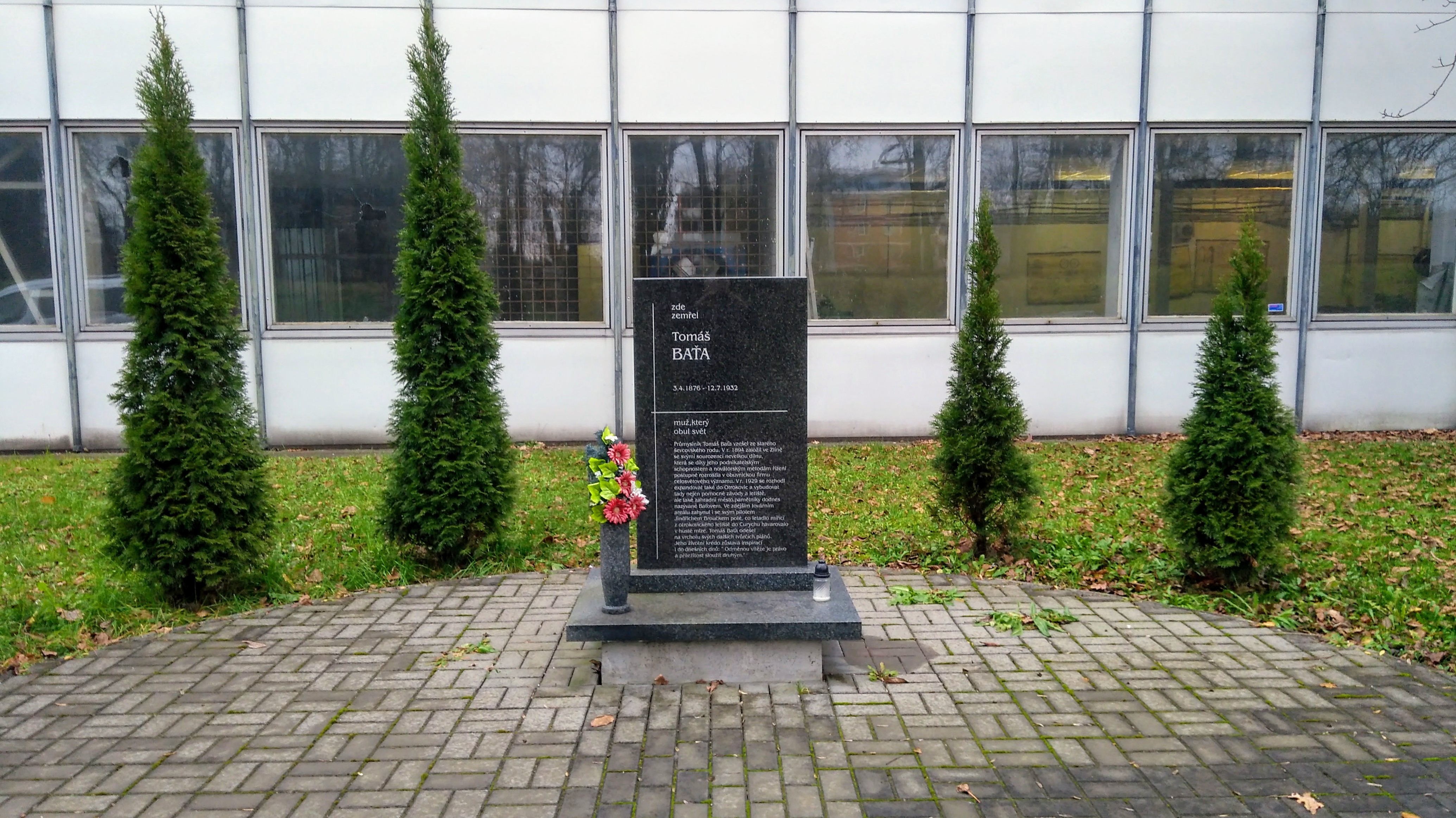 Pomník v místě havárie letadla Tomáše Bati, Otrokovice, areál Toma